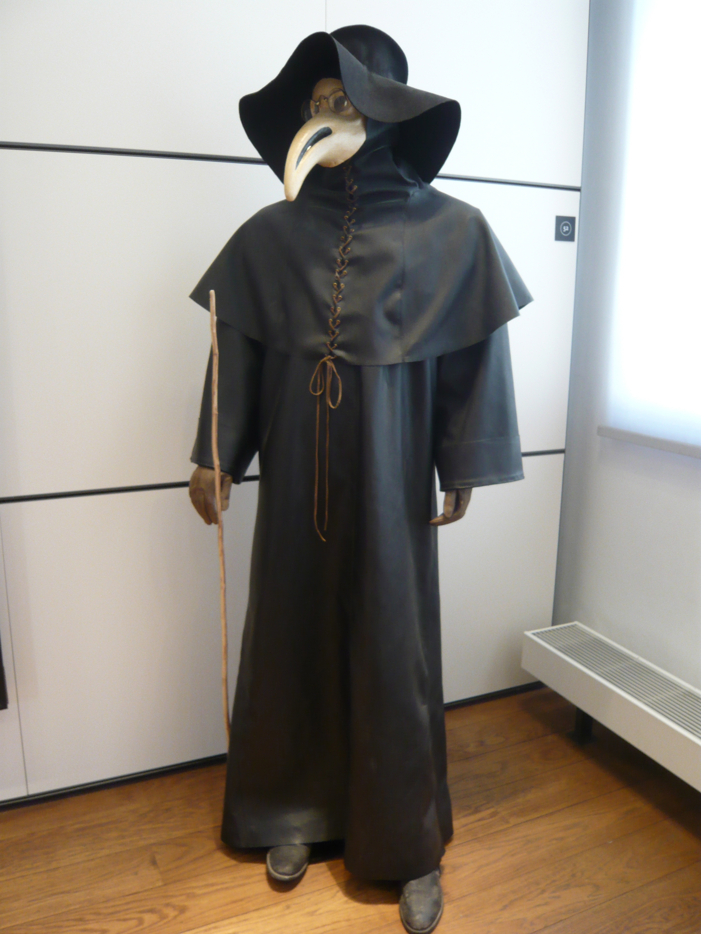 Médecin de la peste Il porte un costume entièrement fait de cuir qui était une carapace efficace contre les puces. Il portait un masque orné d'un bec rempli d’herbes odoriférantes pour masquer l’odeur des cadavres. Pour terminer, une paire de bésicles protégeait les yeux. La baguette servait à soulever les habits des malades.